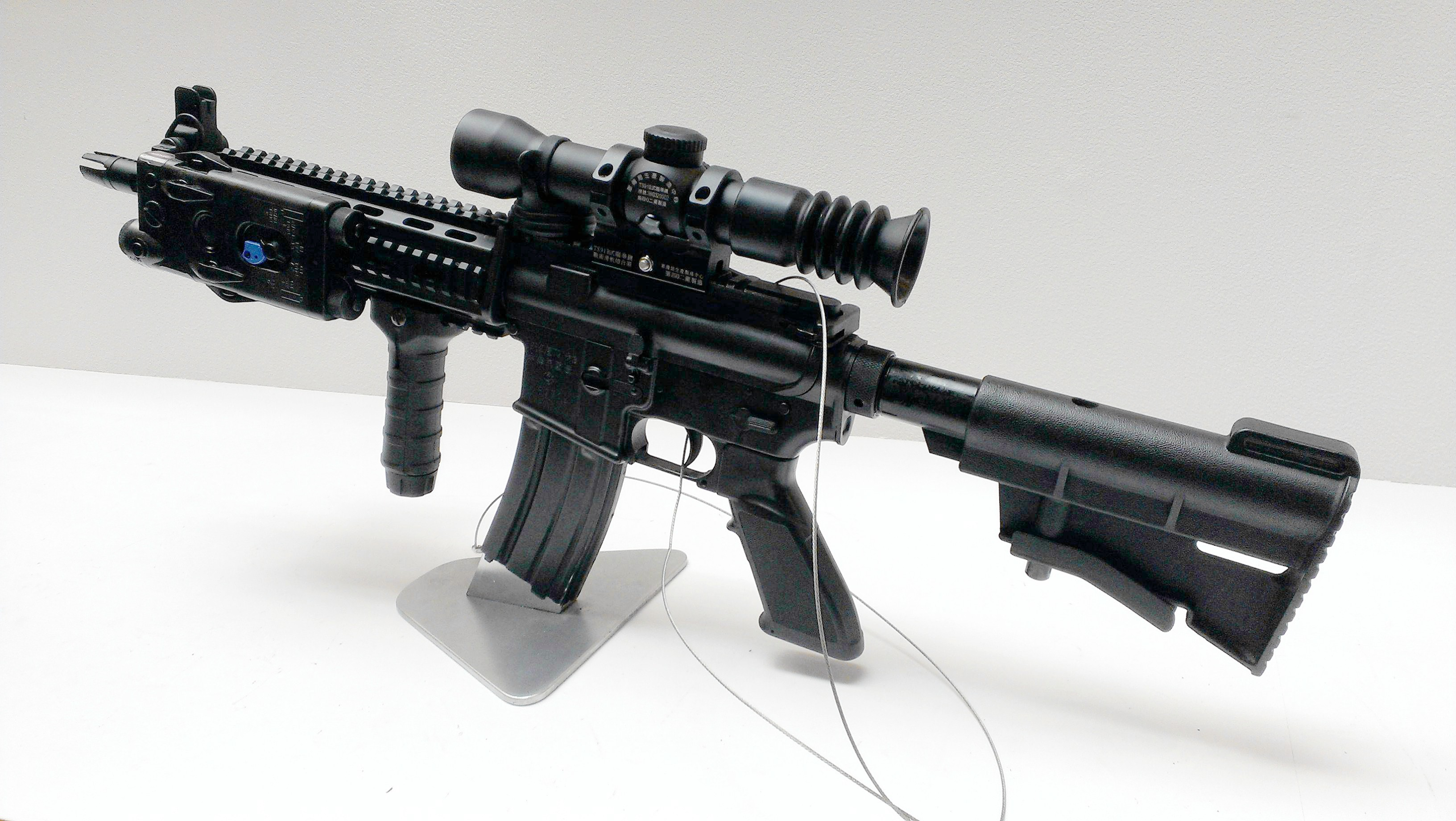 國防展期間由本人拍攝的一把新版T91步槍